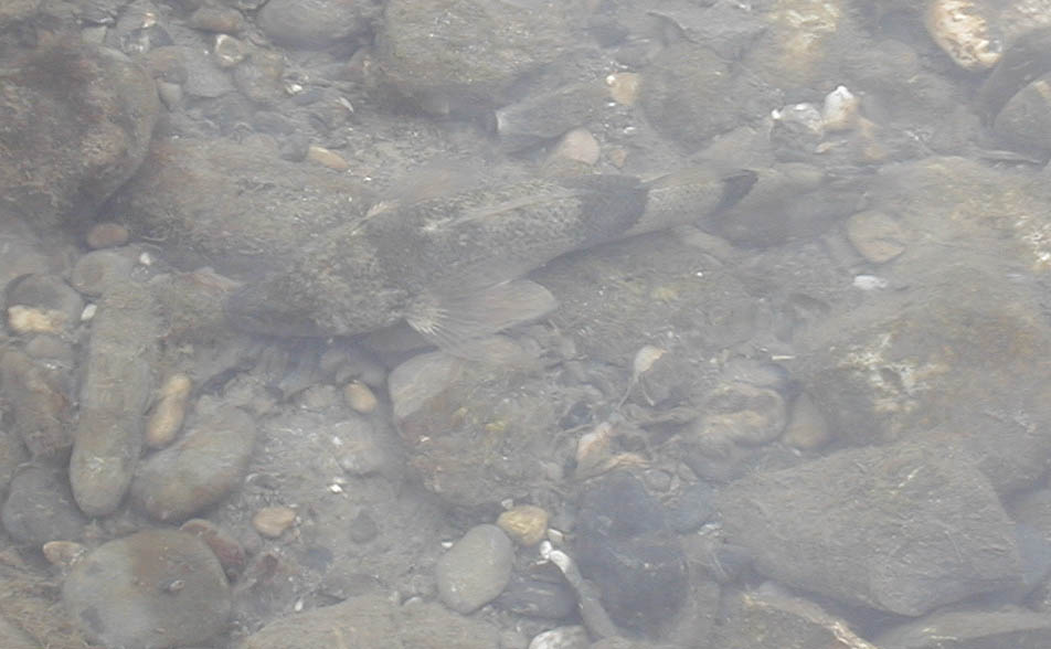 Apron adulte de 14 cm dans son habitat naturel de la Durance (France)